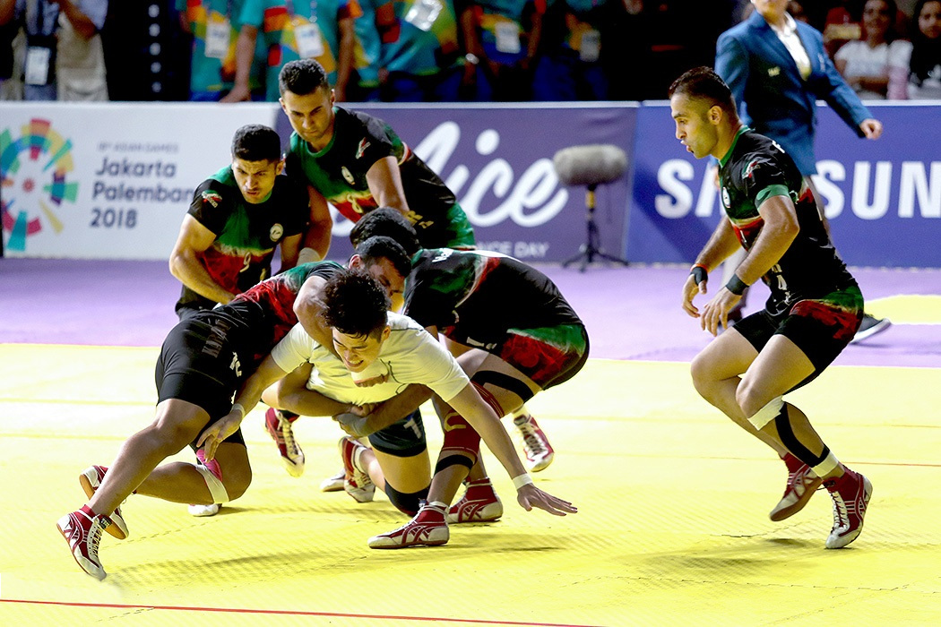 تیم ملی کبدی مردان ایران در بازیهای آسیایی جاکارتا ۲۰۱۸